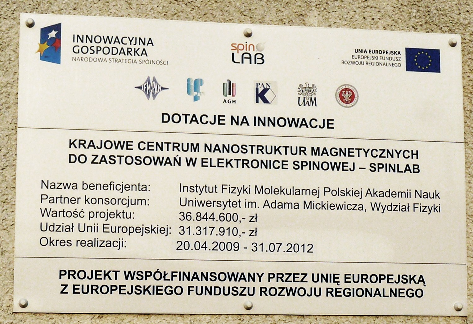 Krajowe Centrum Nanostruktur Magnetycznych do Zastosowań w Elektronice Spinowej - SPINLAB. UAM, Campus Morasko, Poznań.